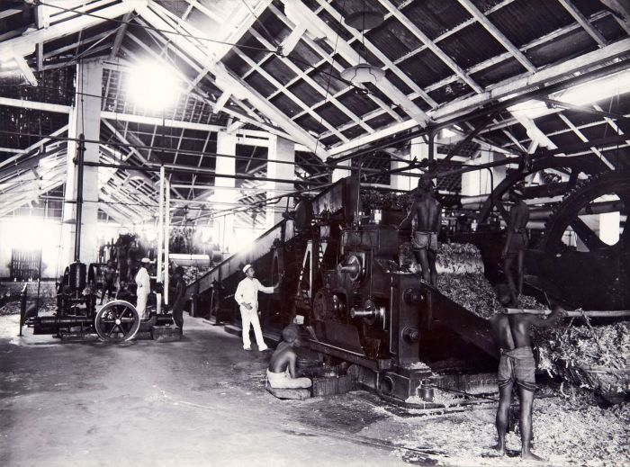 Foto. Het interieur van het molenhuis op de suikeronderneming Kalibagor met de Fletchermolen, op de voorgrond de tweede machinist Van Stenus, op de achtergrond de eerste machinist Ottenhoff.